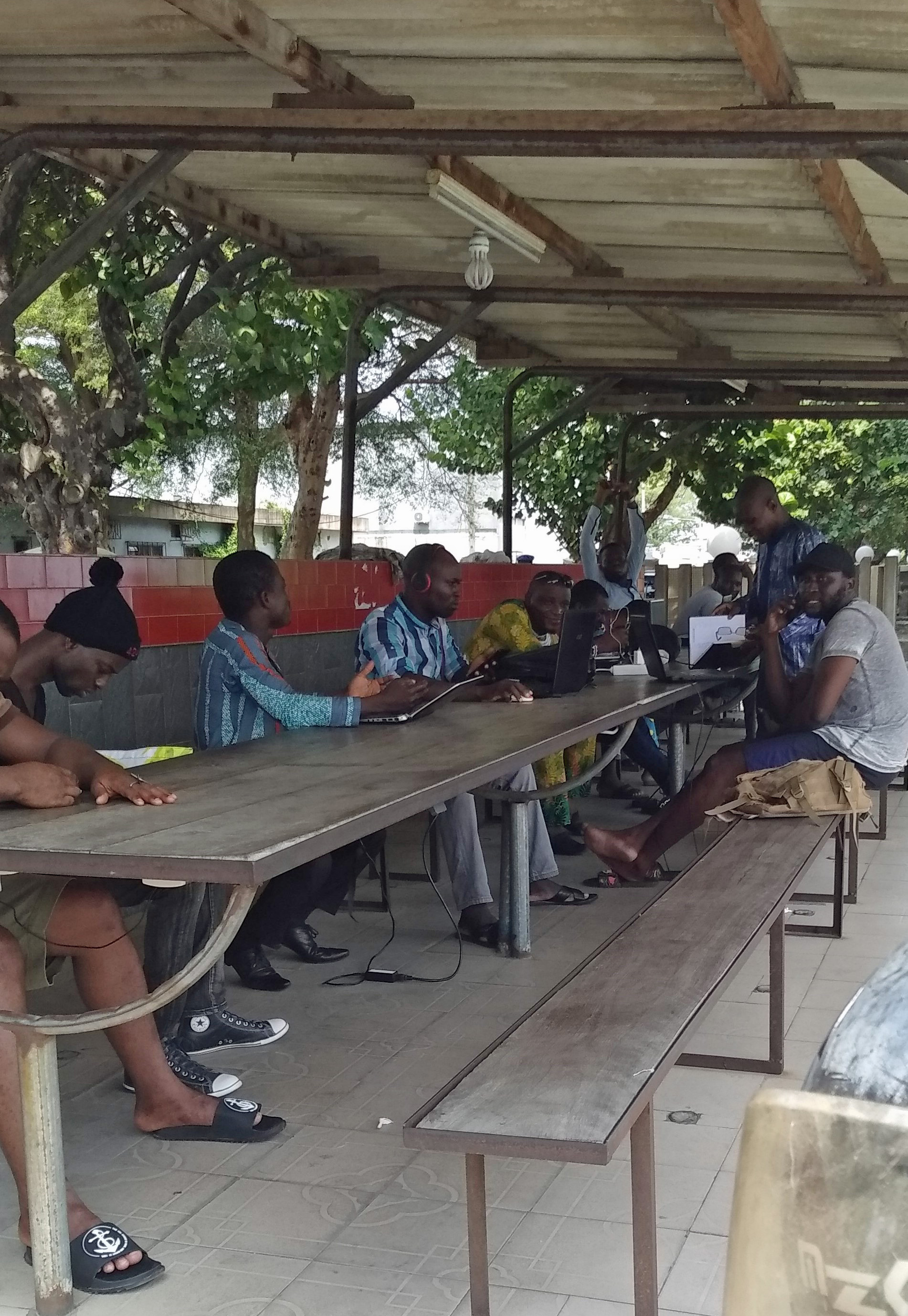 Espace public de connexion internet à Cotonou au Benin afin de permettre aux jeunes un accès facile à la connexion internet. Initié par Bénin Telecom S.A structure étatique du Bénin